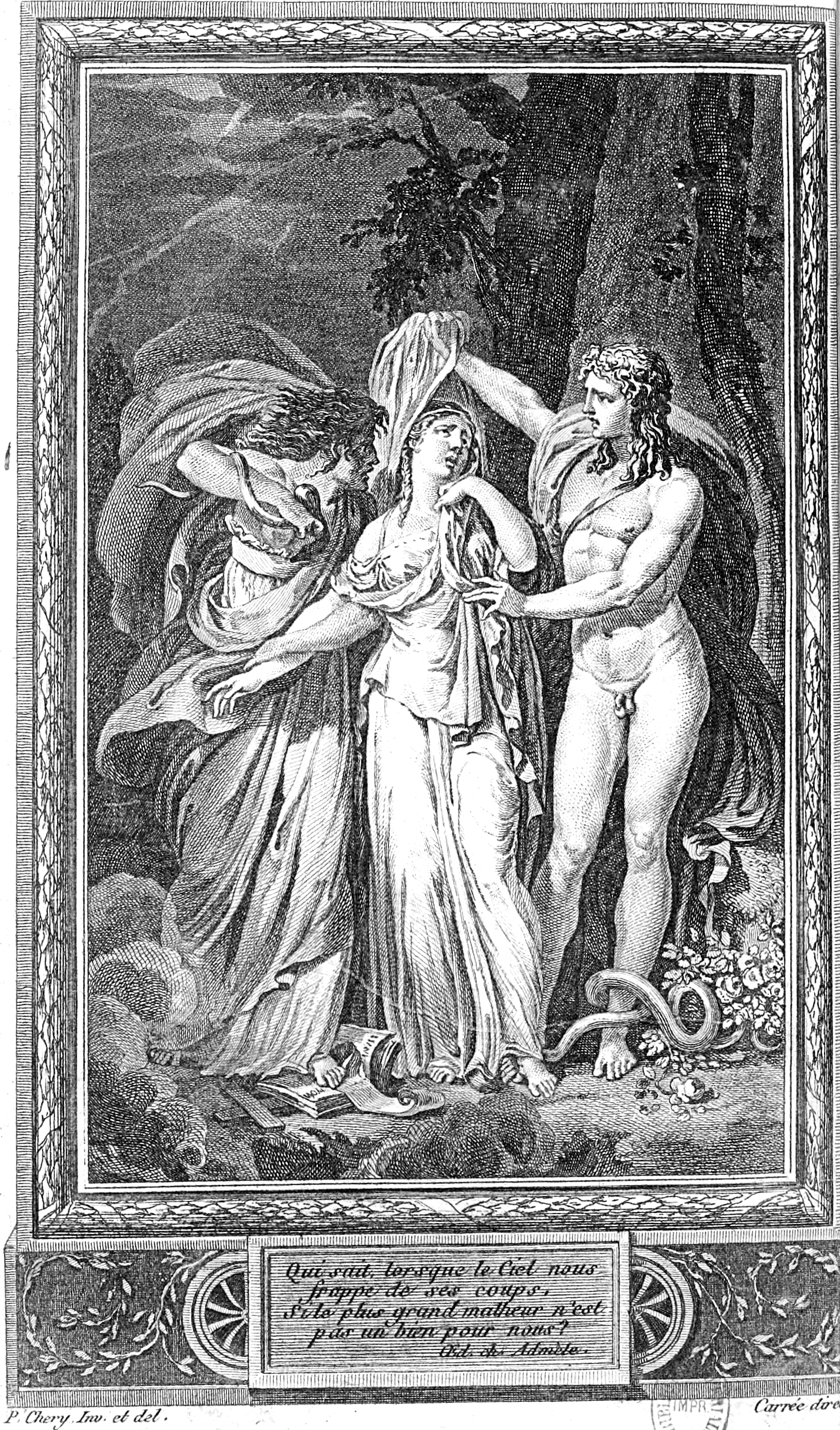 frontispice de Justine, ou les Malheurs de la vertu Cette gravure allégorique reprend en le pervertissant le motif iconographique du Choix d’Hercule tel qu’il s’est développé à partir de l’ekphrasis de Philostrate dans La Vie d’Apollonius de Tyane. Mais bien-sûr la Vertu n’est pas censée avoir à choisir entre la Luxure et l’Irréligion. On peut également lire la gravure non pas de façon allégorique, comme y invite le texte qui l’accompagne, mais comme prototype de la scène sadienne, associant la tribade, la vierge et le libertin. Enfin, le décalage entre le dispositif générique du choix d’Hercule et le dispositif allégorique explicitement annoncé peut s’avérer signifiant : Justine au centre écarte une figure horrifiante de la mère en Furie pour se tourner vers le bel Apollon, faisant le choix de l’amour, comme si, secrètement, Justine désirait le libertin. Certes, c’est vers le Ciel que Justine tourne les yeux, et c’est la Luxure qui la déshabille. Mais le Ciel est vide et c’est vers Apollon que Justine est tournée À gauche est la Luxure, sous la figure d’un jeune homme dont la jambe est entourée d’un serpent, symbole de l’auteur de nos maux ; elle enlève d’une main le voile de la Pudeur, qui dérobait la Vertu aux regards des profanes, et de l’autre, ainsi que de son pied droit, dirige la chute dans laquelle elle veut la faire succomber. À droite est l’Irréligion qui retient avec force un des bras de la Vertu, tandis que d’une main perfide elle arrache un serpent de son sein, pour l’empoisonner. L’abîme du Crime s’entrouvre sous leur pas. La Vertu, toujours forte de sa conscience, lève les yeux vers l’Éternel.